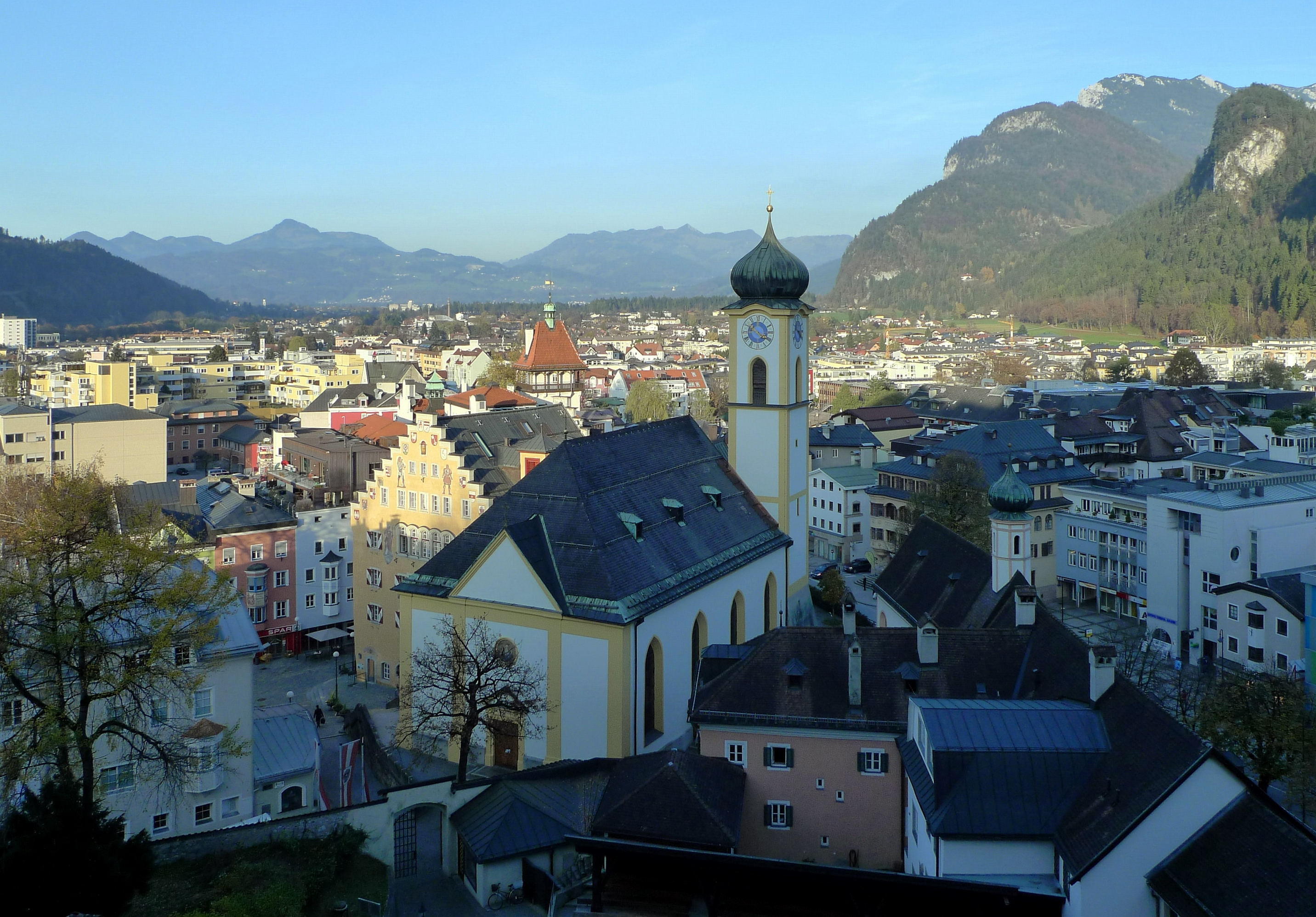 Blick über Kufstein von der Festung aus